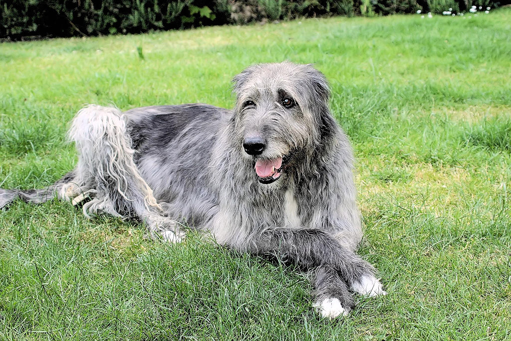 Fergus